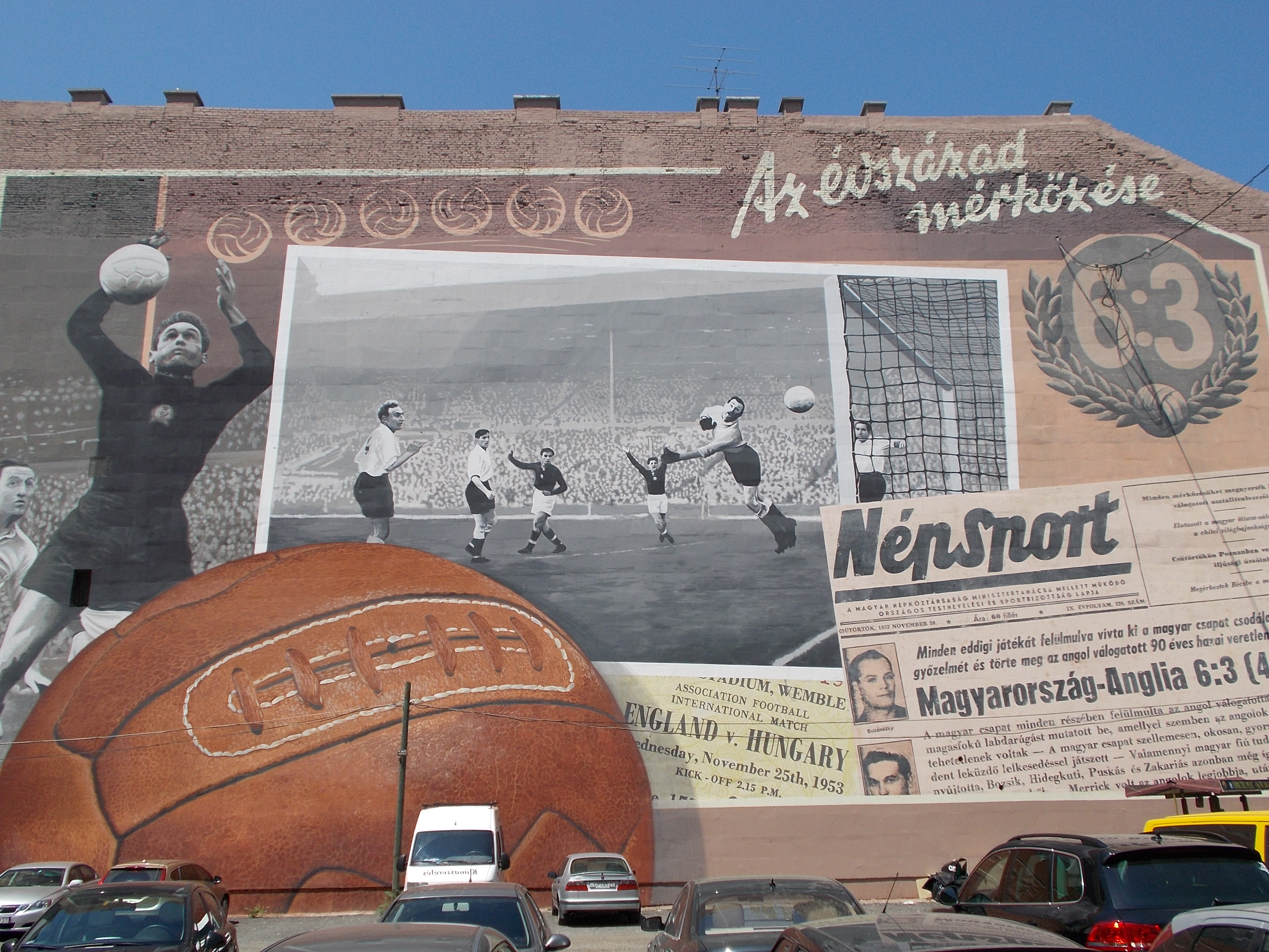 Az évszázad labdarugómérkőzése. (A magyarok számára) Óriás falfestés. Parkoló. - Budapest VII. Rumbach Sebestyén utca 6-10